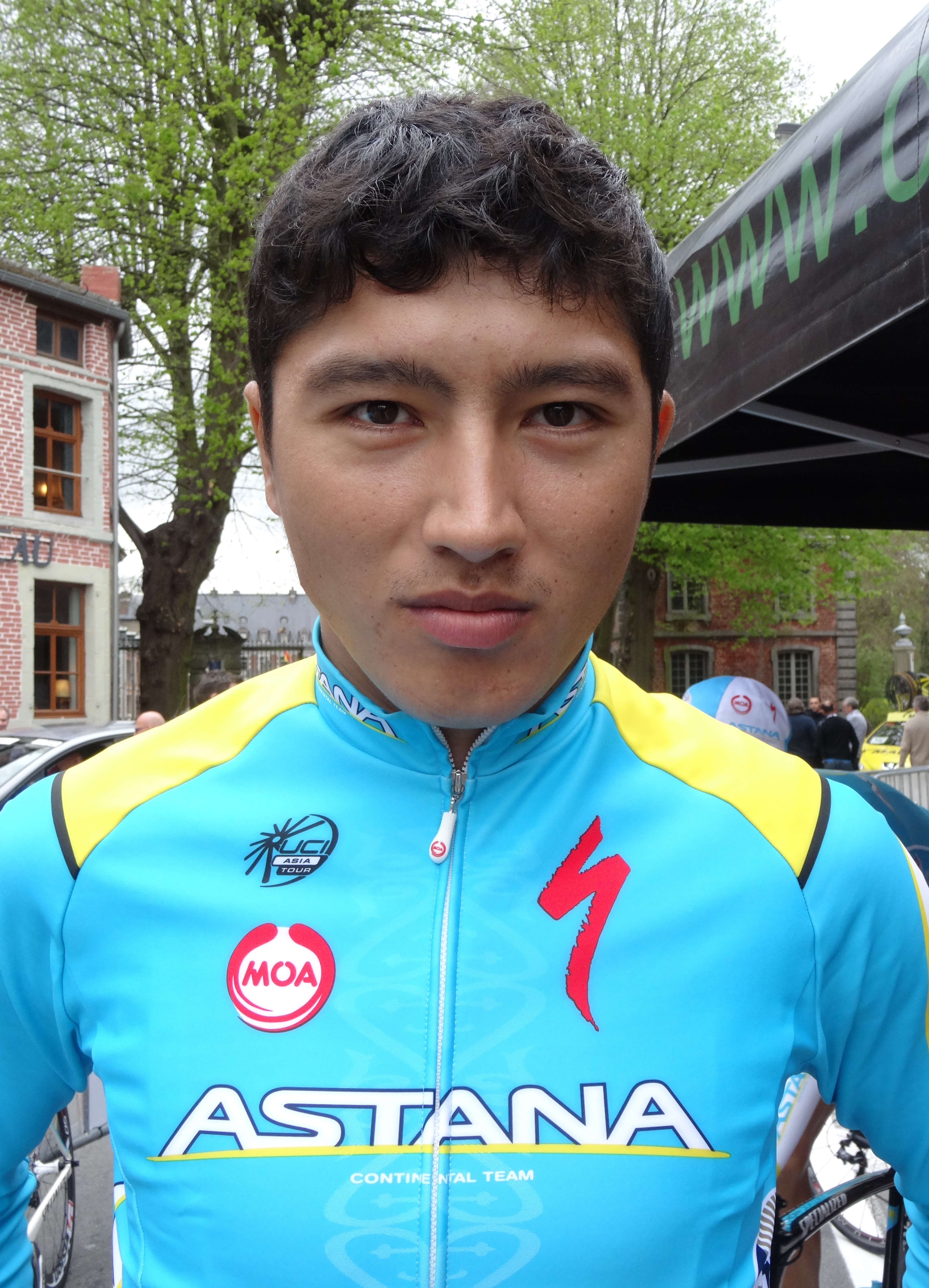 Triptyque des Monts et Châteaux 2014, étape 3, 6 avril 2014, départ de Belœil. Depicted person: Maxat Ayazbayev Depicted team: Astana Continental The creation of these files was made possible thanks to the organizers of the Triptyque des Monts et Châteaux 2014 English | français | +/−